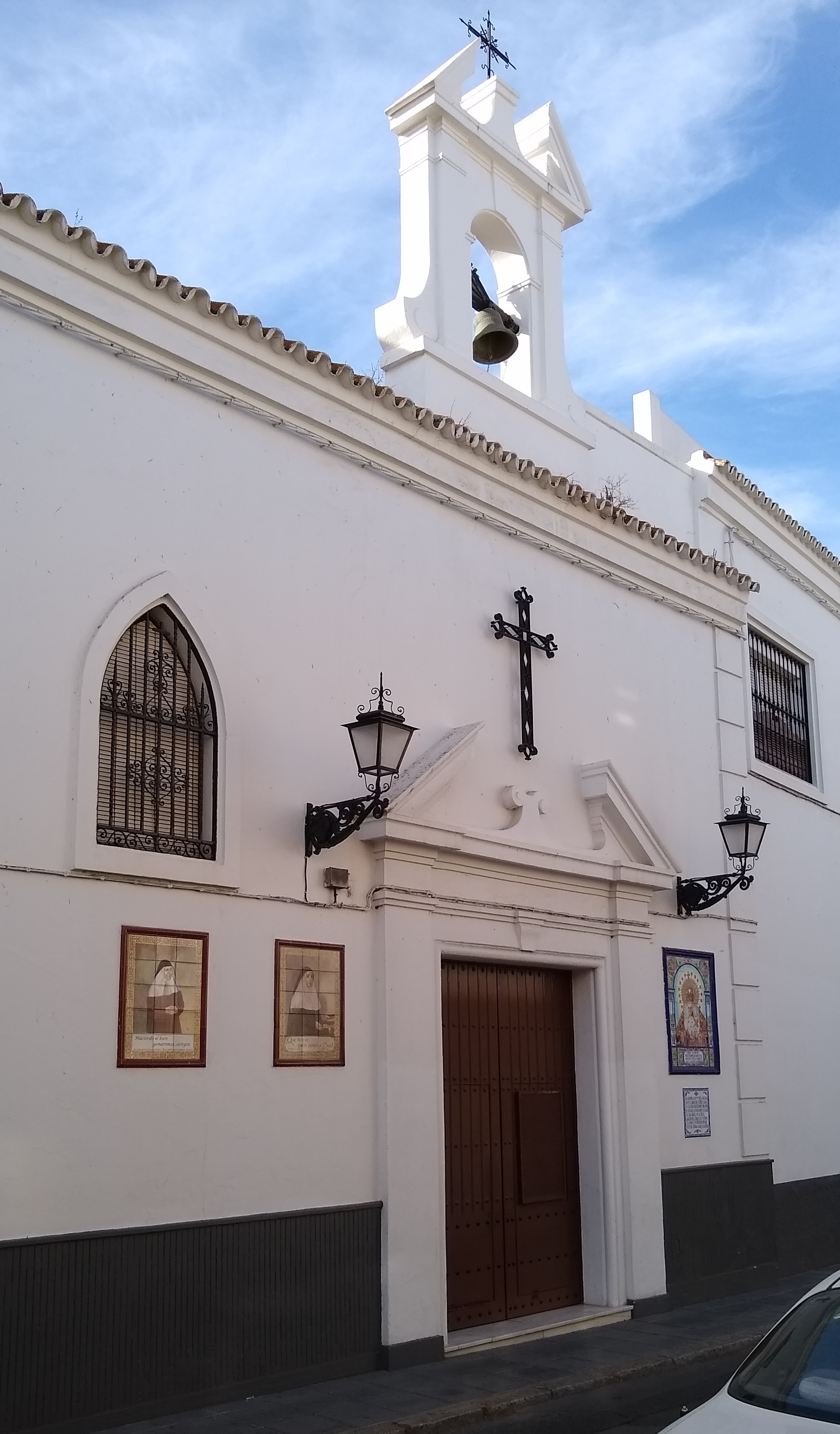 Convento de las Hermanas de la Cruz. Coria del Río, provincia de Sevilla, Andalucía, España.